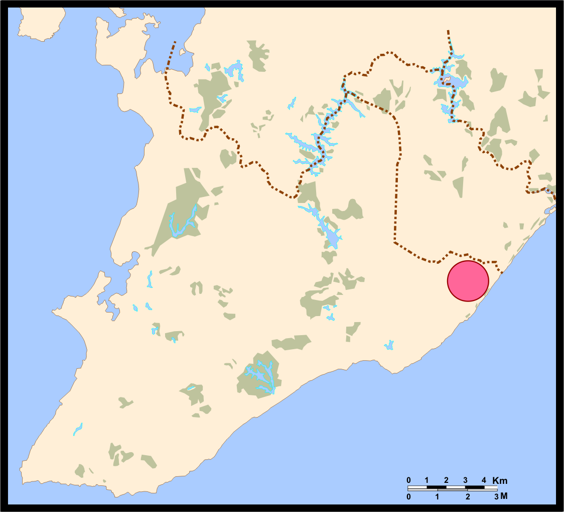 Mapa de Salvador (Bahia, Brazil) - sub-distrito de São Cristóvão.